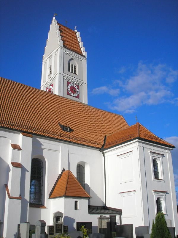 Pfarrkirche St. Stephan (Kissing, Landkreis Aichach-Friedberg, Bayerisch-Schwaben). Das Langhaus und der Turm von Süden. Eigene Aufnahme, Okt. 2006. / Parish church St. Stephen at Kissing near Augsburg (Bavaria, Germany). Nave and tower from the south. Own photo, Oct. 2006